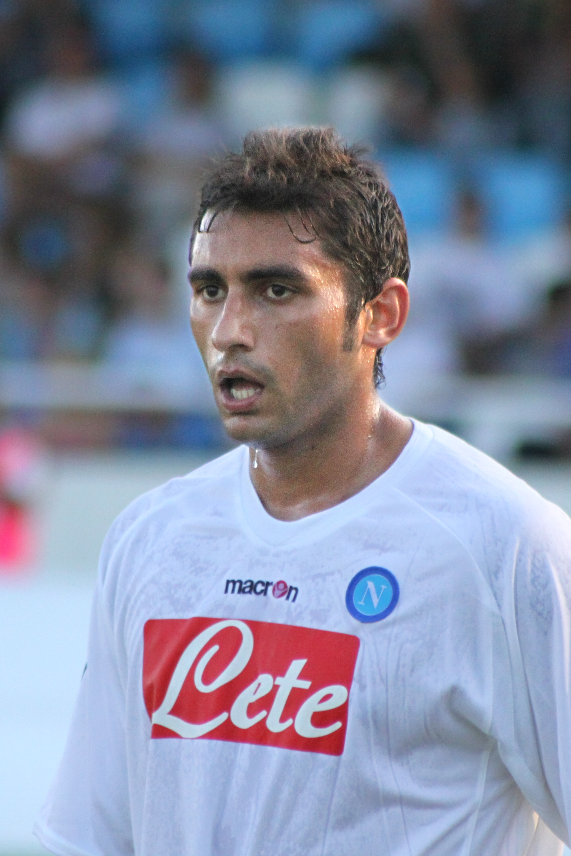 Michele Pazienza - SSC Neapel (1) Michele Pazienza - Società Sportiva Calcio Napoli